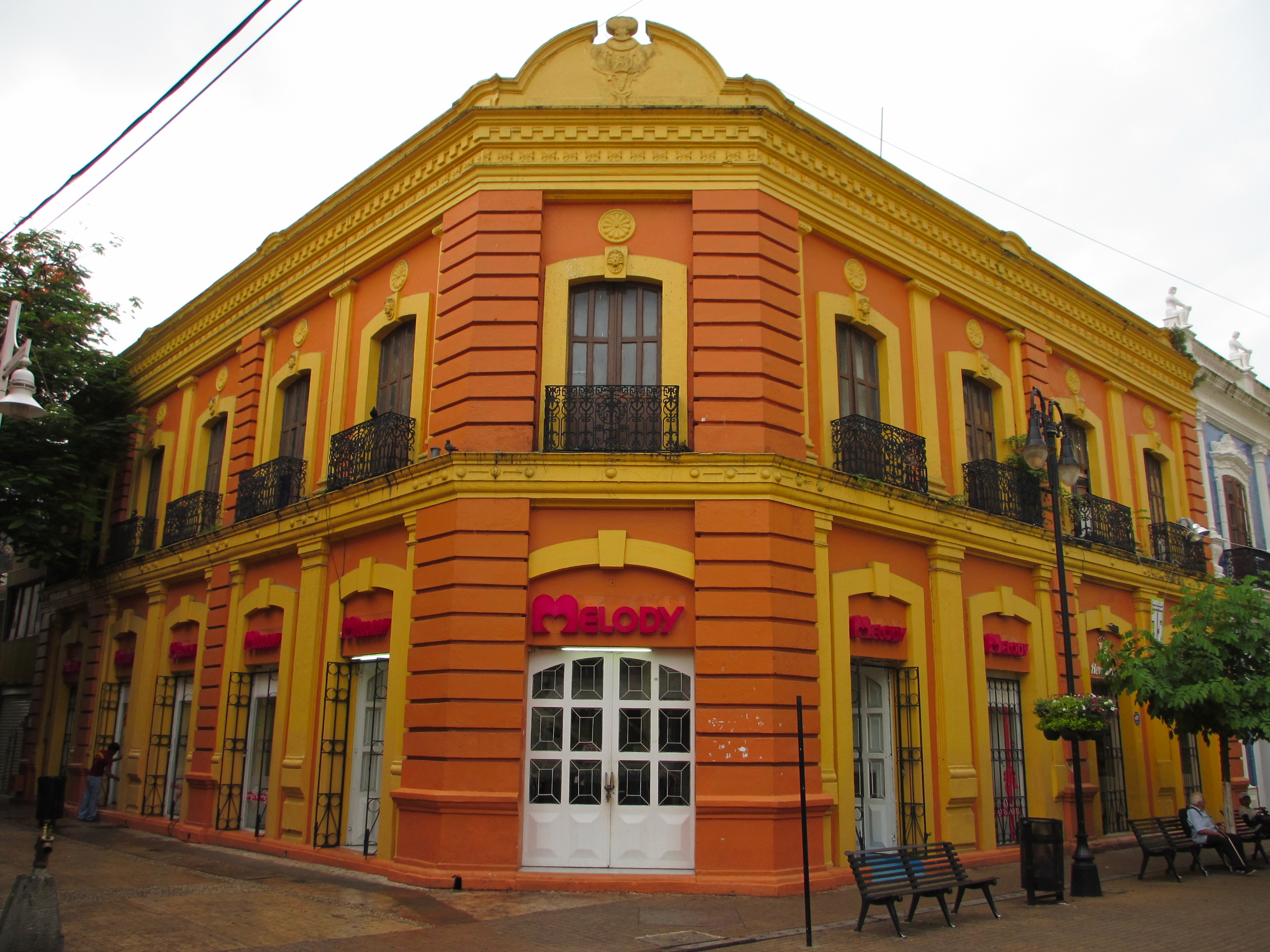 Vèneto: Edificio construido en la década de 1850. Fue sede del Poder Ejecutivo del estado en 1857 siendo gobernador Don Victório Victorino Dueñas, y en 1885 siendo gobernador el Coronel Gregorio Méndez Magaña. En 1896 fue la sede del Banco Nacional de México.